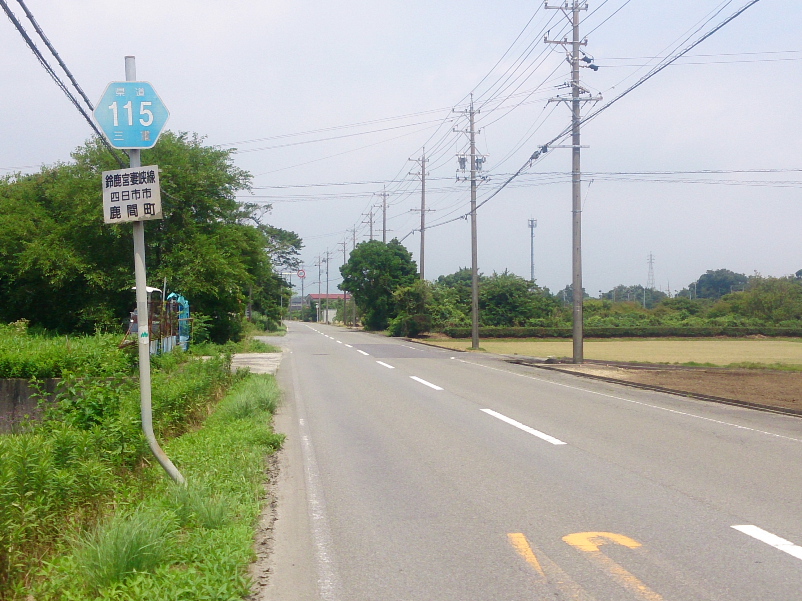 三重県道115号鈴鹿宮妻峡線, 三重県四日市市鹿間町